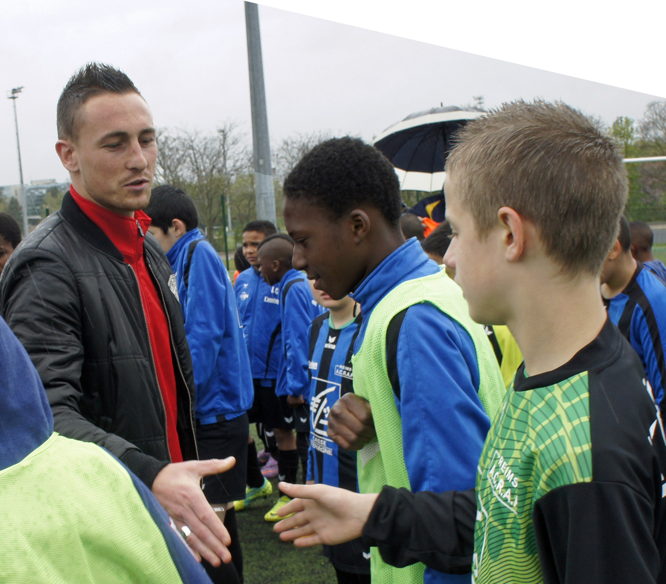 Une journée de rencontre de joueurs du Stade de Reims avec des jeunes de Croix Rouge pour les 100 ans du Foyer rémois.